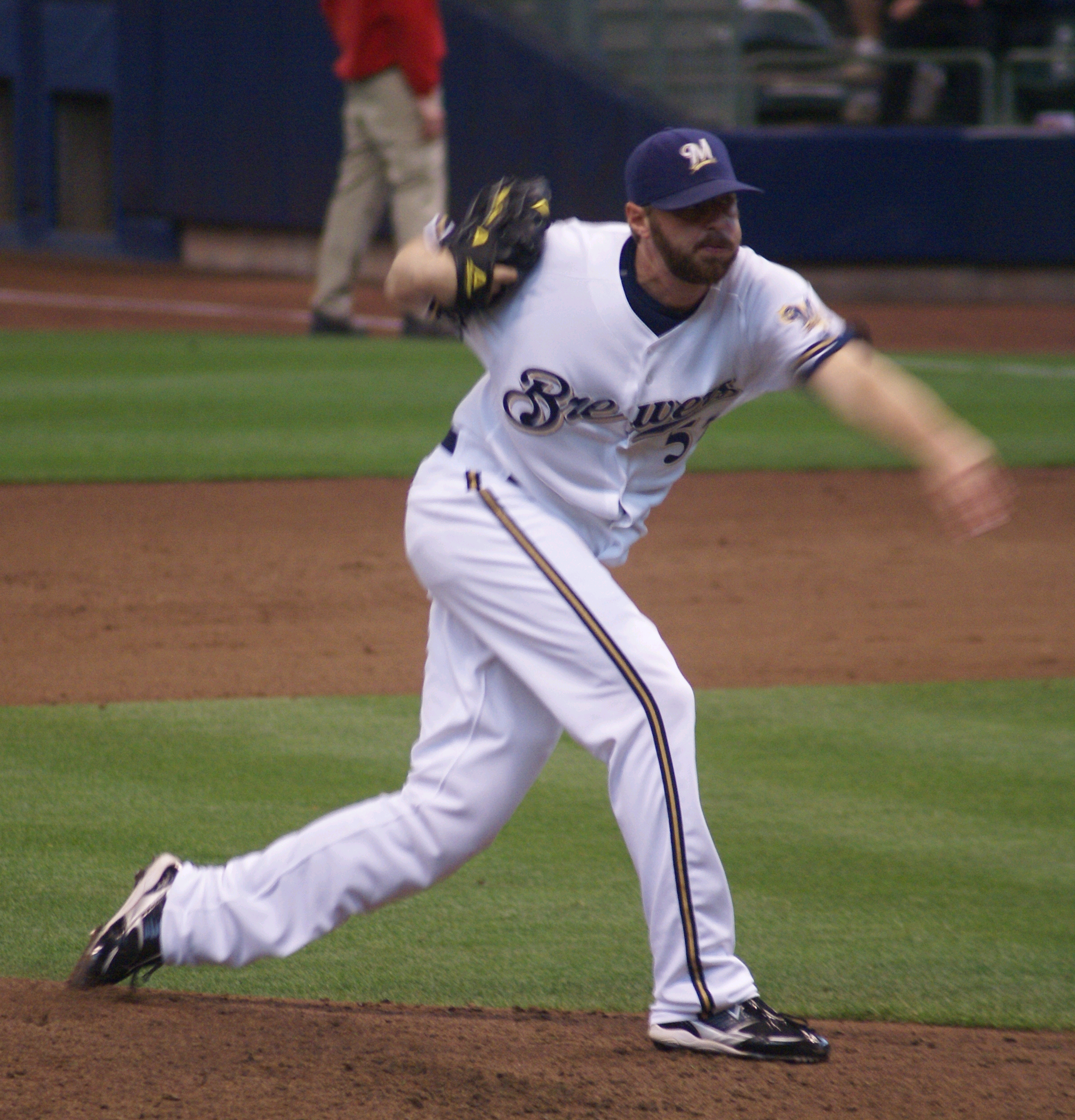 Mitch Stetter